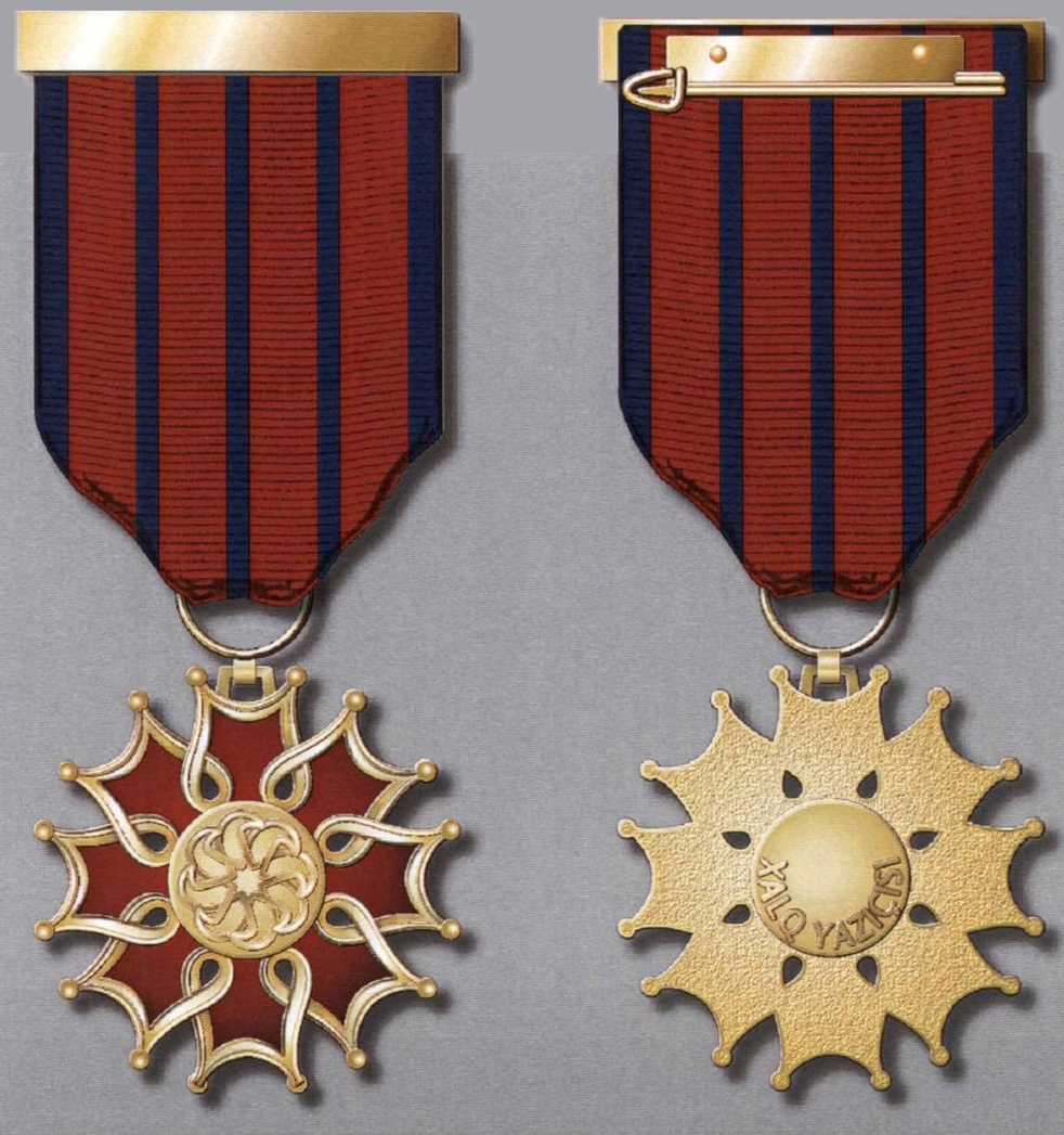 “Xalq yazıçısı” fəxri adının döş nişanı